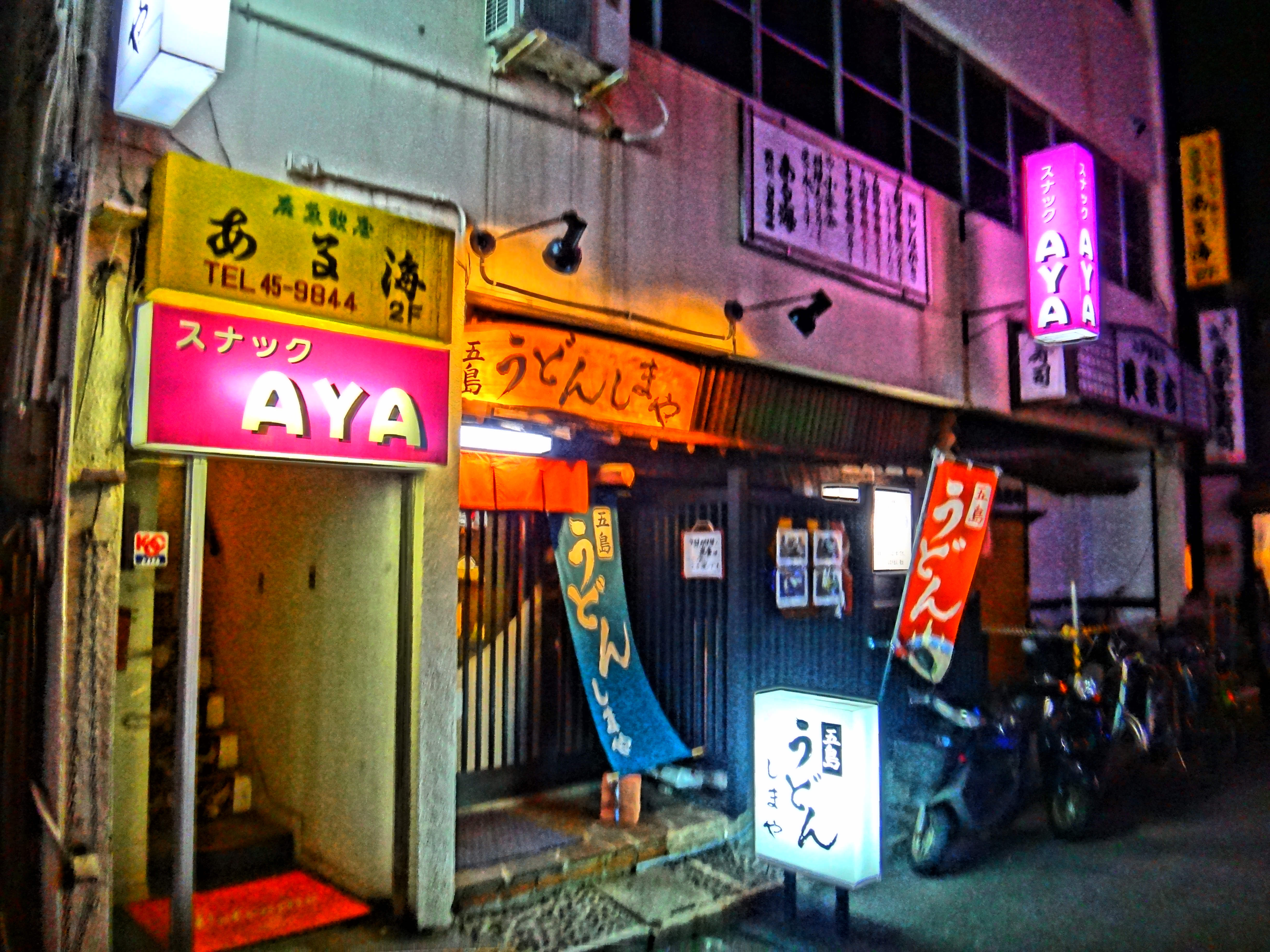 Aya, Hamaguchi machi